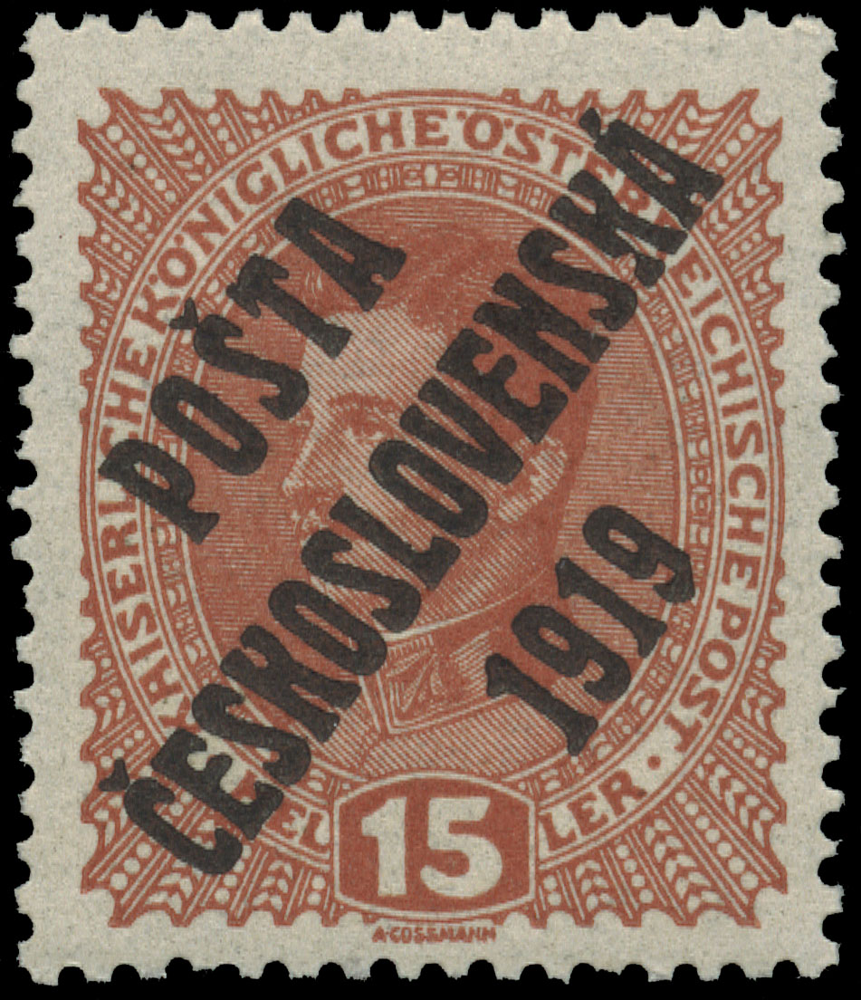 Почтово-благотворительная марка Чехословакии. Надпечатка на марке Австрии